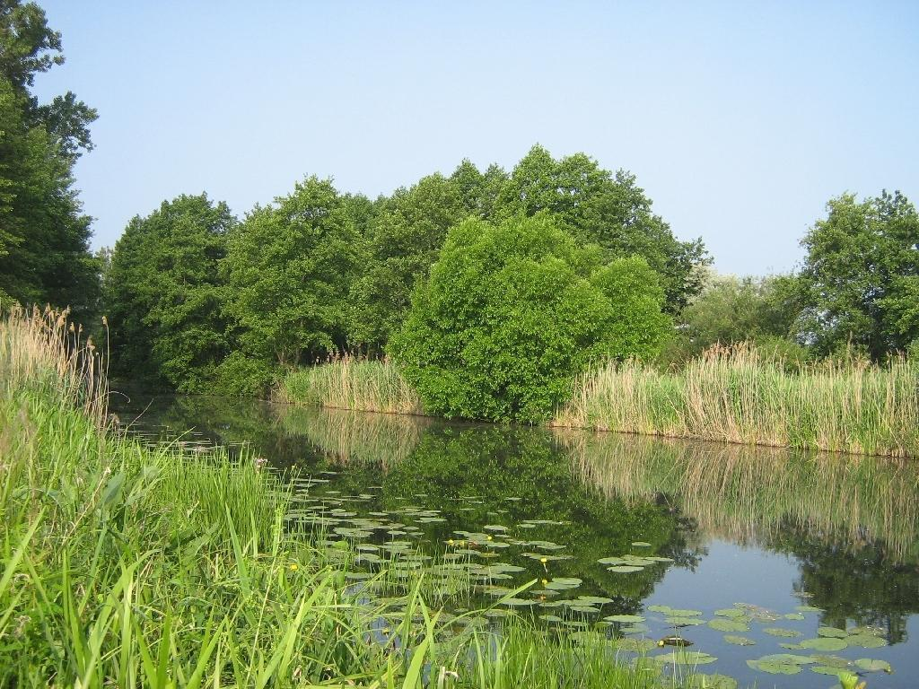 Der Dahme-Umflutkanal, zwischen Leipsch und Köthener See (Landkreis Dahme-Spreewald, Brandenburg).